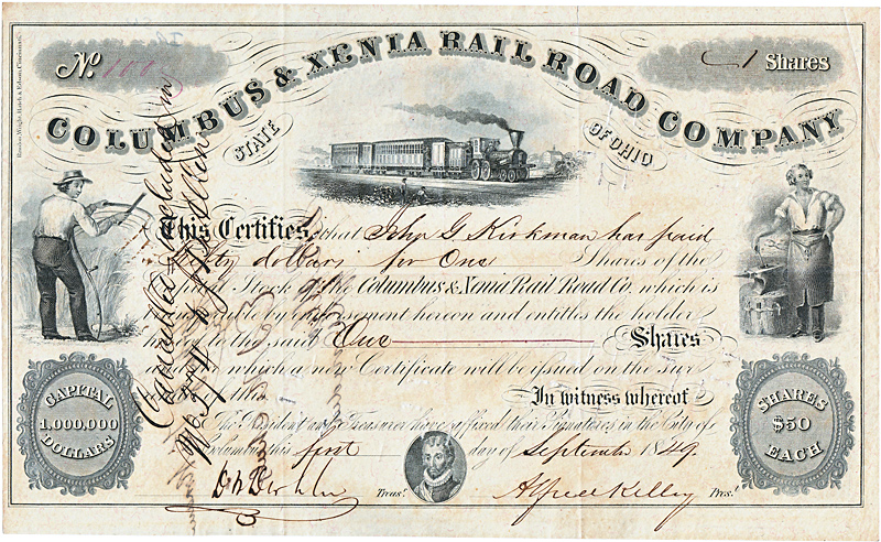 Aktie der Columbux & Xenia Railroad Company vom 1. September 1849